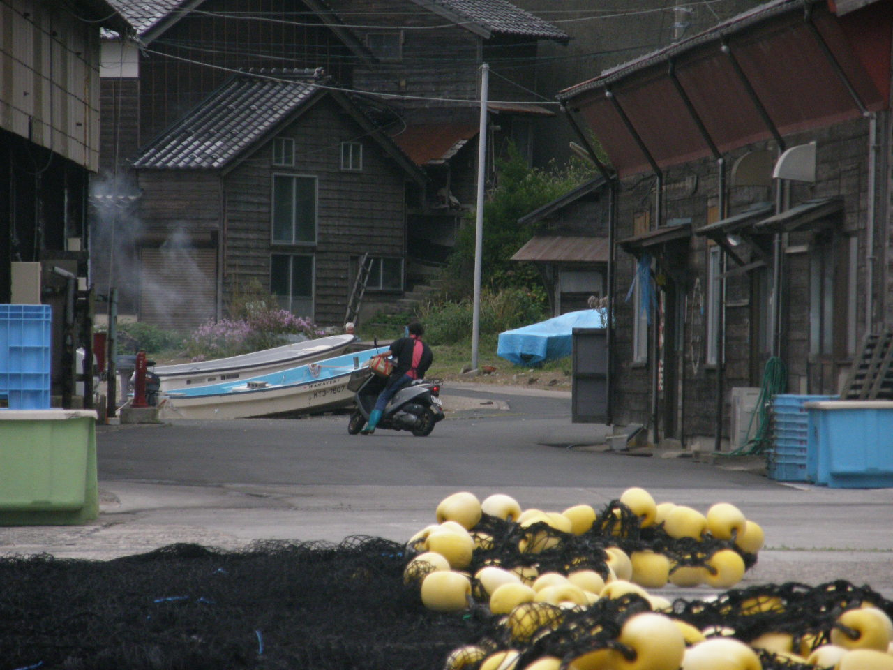 Ine-ura fishing port（伊根漁港）.2010-10-03